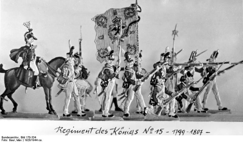 Potsdam.- Zinnsoldaten Regiment des Königs No 15; 1799-1807